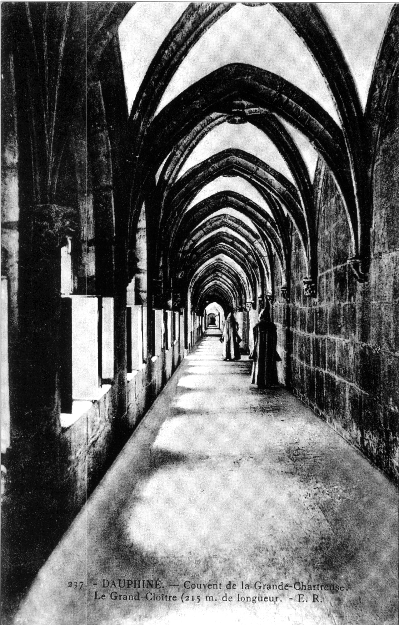 Saint-Pierre-de-Chartreuse, couvent de la Grande-Chartreuse, le grand-cloitre 215 m de longueur